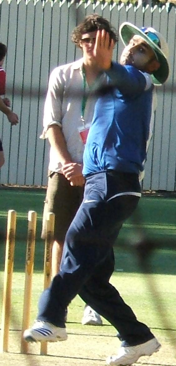 Virender Sehwag bowling at Adelaide Oval